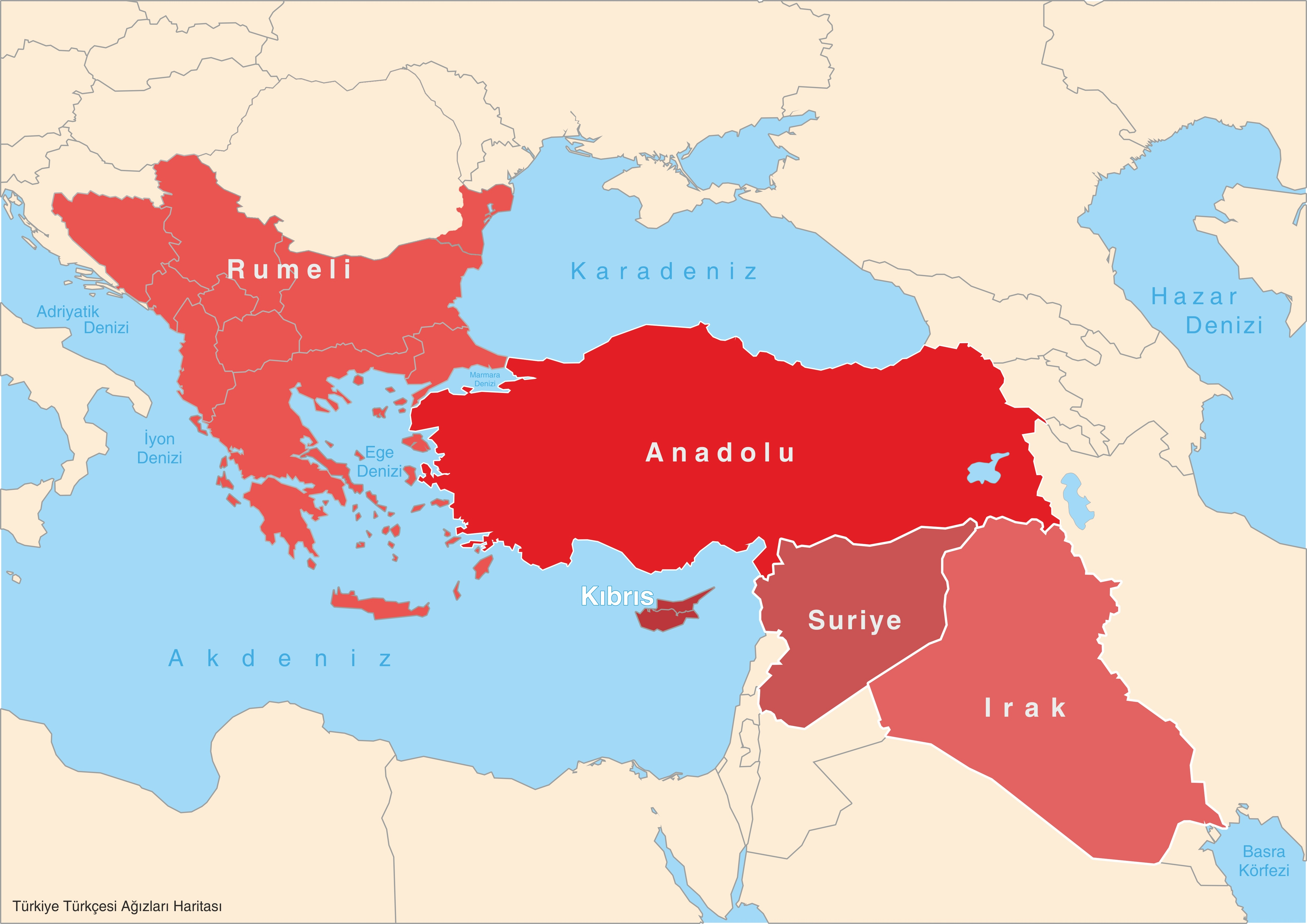 Türkiye Türkçesi ağızları haritası Harita kaynakları: Ana kaynaklar: Karahan, Leyla 1996, Anadolu Ağızlarının Sınıflandırılması, Türk Dil Kurumu, Ankara Németh, Gyula 1983, “Bulgaristan Türk Ağızlarının Sınıflandırılması Üzerine”, TDAY Belleten 1981-1982, Türk Dil Kurumu, Ankara, 113-167 Diğer kaynaklar: Bayatlı, Hidayet Kemal 1996, Irak Türkmen Türkçesi, Türk Dil Kurumu, Ankara Demir, Nurettin 2003, “Kıbrıs Ağızları Üzerine Çeşitlemeler”, Türk Dili, Sayı 614 / Şubat 2003, 203-208 İğci, Alpay 2013, “Konuşulan Dil Türkiye Türkçesinin Sahası”, Ufuk Dergisi, S: 21, Ocak-Mart 2013, 6-8 Saracoğlu, Erdoğan 2012, Kıbrıs Ağzı, Akçağ, Ankara